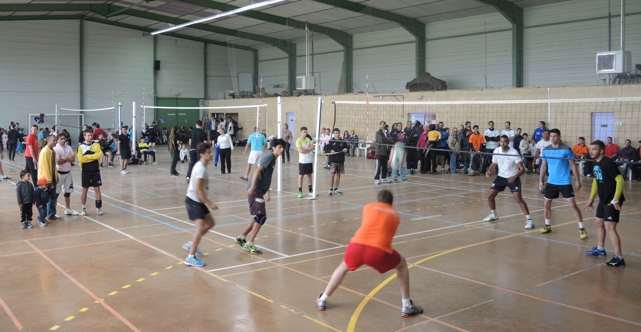 Charnas détail